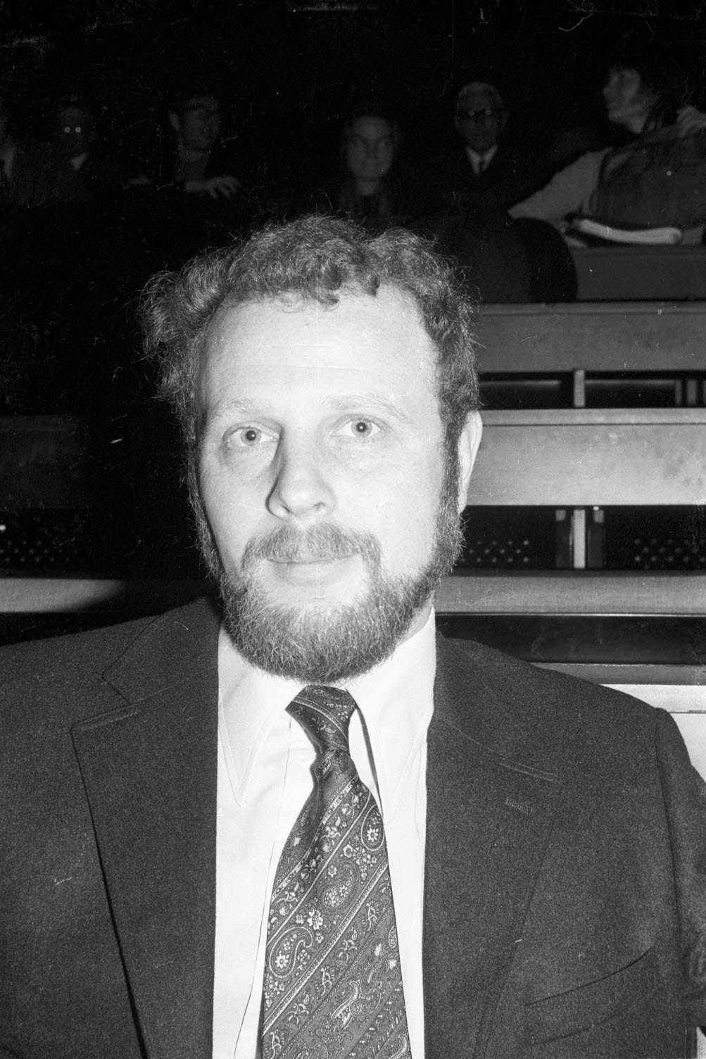 Assistent am Nordischen Institut der Christian-Albrechts-Universität (CAU) und Referent der Kieler Universitätstage 1973 zur Rolle einiger schwedischer Schriftsteller im 2. Weltkrieg.